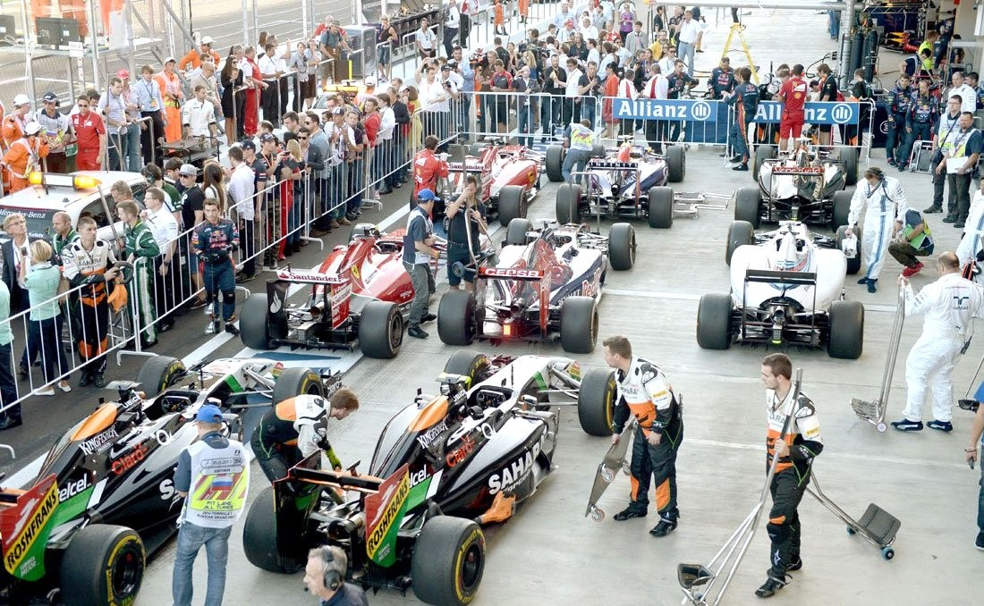 Гран При Россия 2014